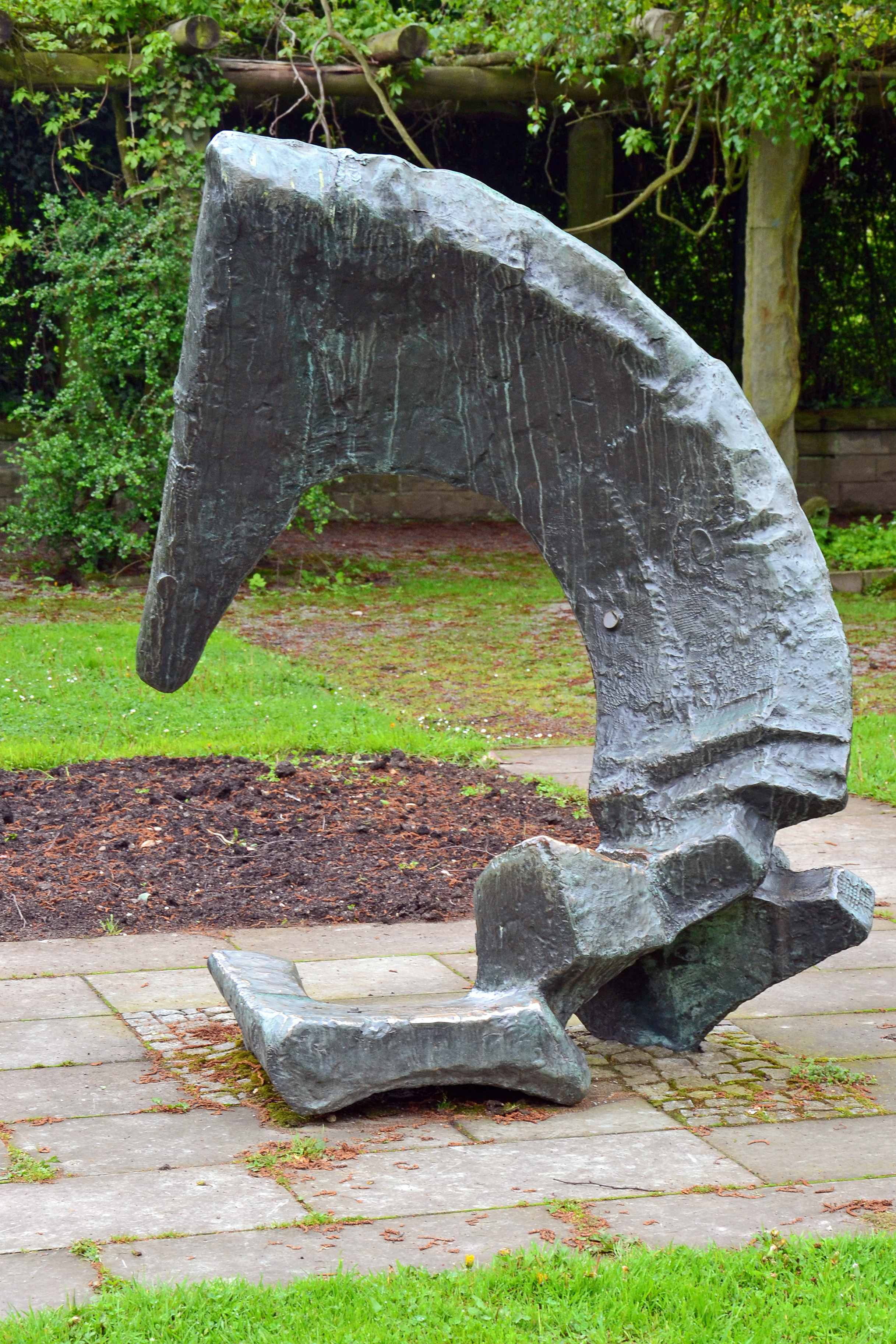 Skulptur im Grugapark Essen: Kurt Link, Trinkbrunnen 1965